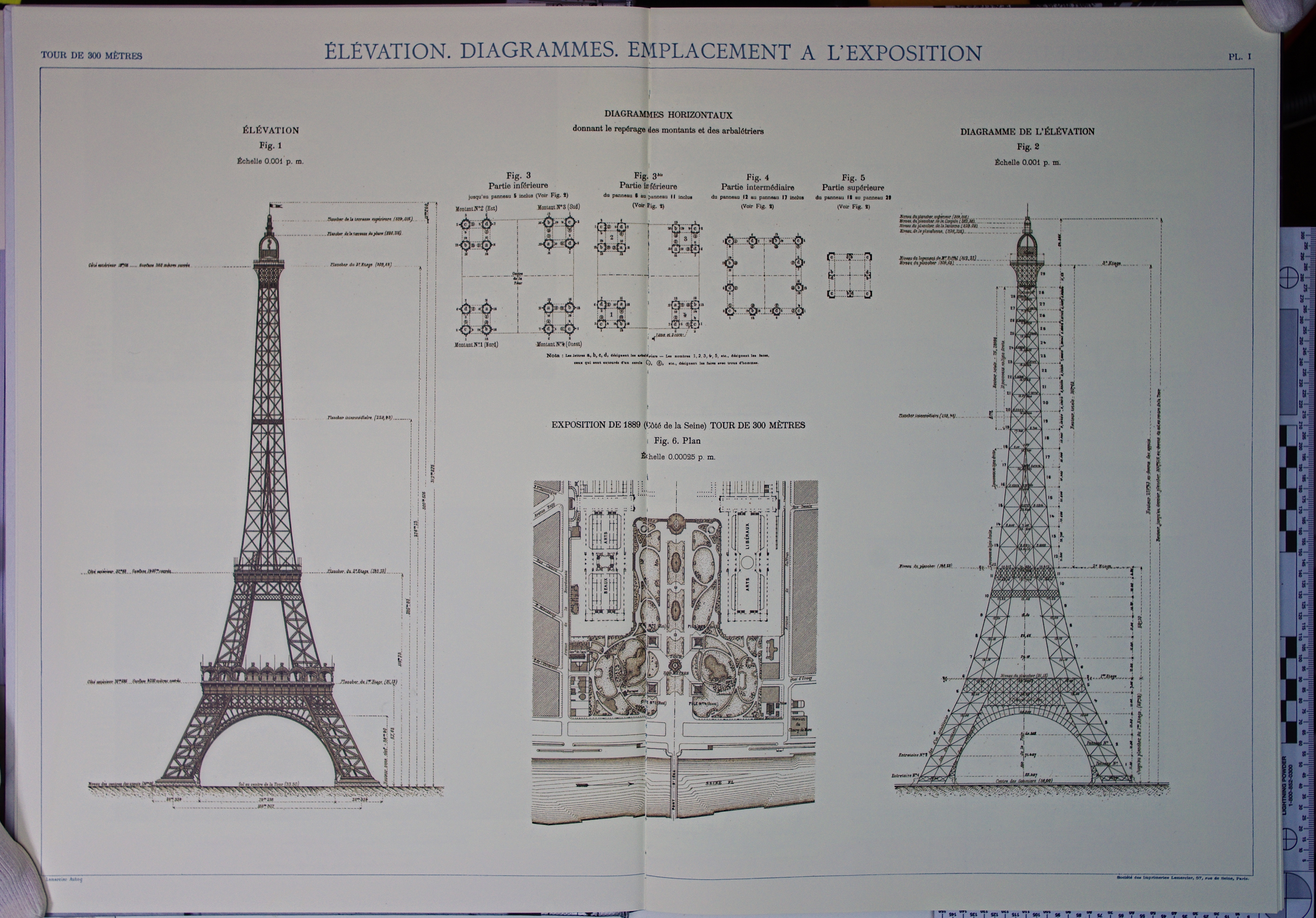 Dieser Aufriß ist der endgültige Entwurf, der dem Bau von 1887 bis 1889 zu Grunde liegt. 1900, 1932 und 1982 wurden die Aufbauten auf den Platformen verändert